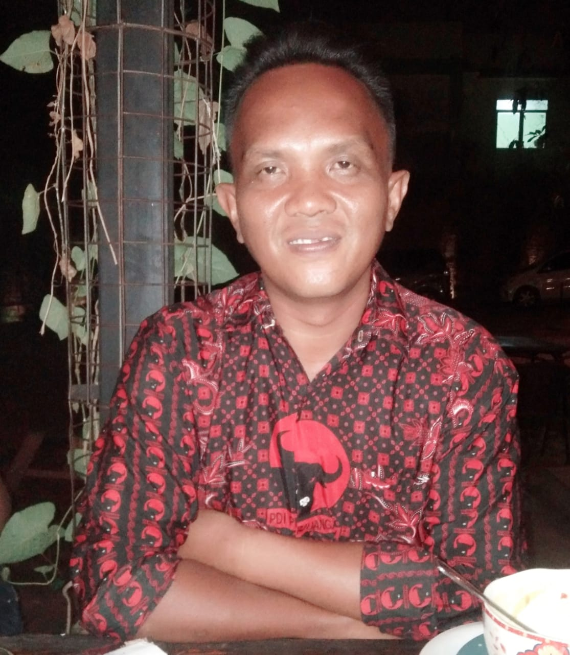 Yusrianto adalah alumni Gerakan Mahasiswa Nasional Indonesia (GMNI), organisasi mahasiswa nasionalis dan loyalis Soekarno. Ia sudah akrab dengan dunia politik sejak masih kuliah, meskipun karirnya setelah lulus kuliah terbilang jauh dari minatnya semasa kuliah. Namun ia tetap memiliki tekad untuk berjuang di bidang politik, untuk itulah ia nekat mencalonkan diri sebagai calon walikota Tangerang Selatan periode 2020-2025.